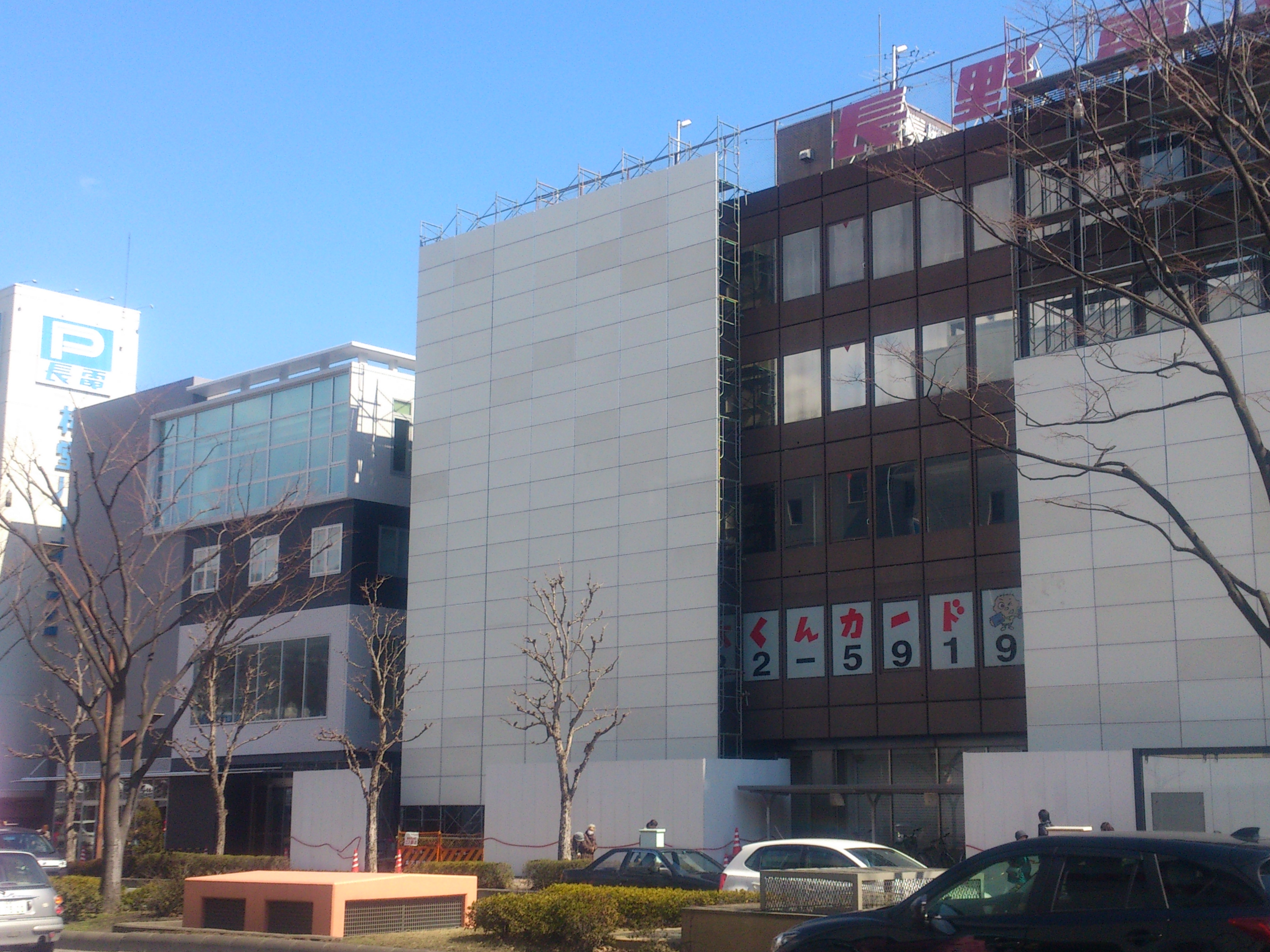 権堂イーストプラザND（仮開業・2014年3月15日現在）